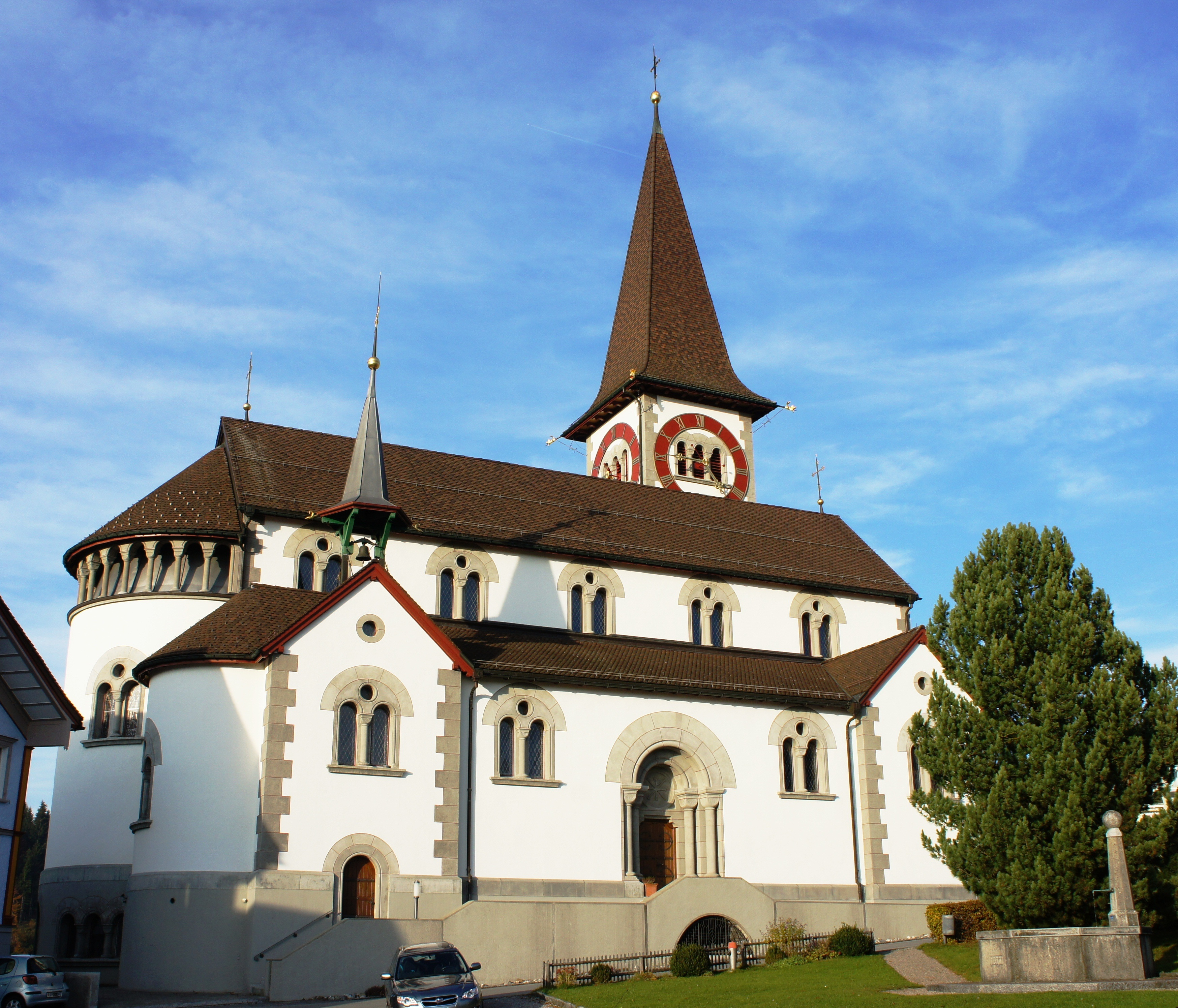 Blick aus Südwesten auf die Kirche in Haslen. Im Vordergrund der Dorfplatz mit kleinem Park und Brunnen.